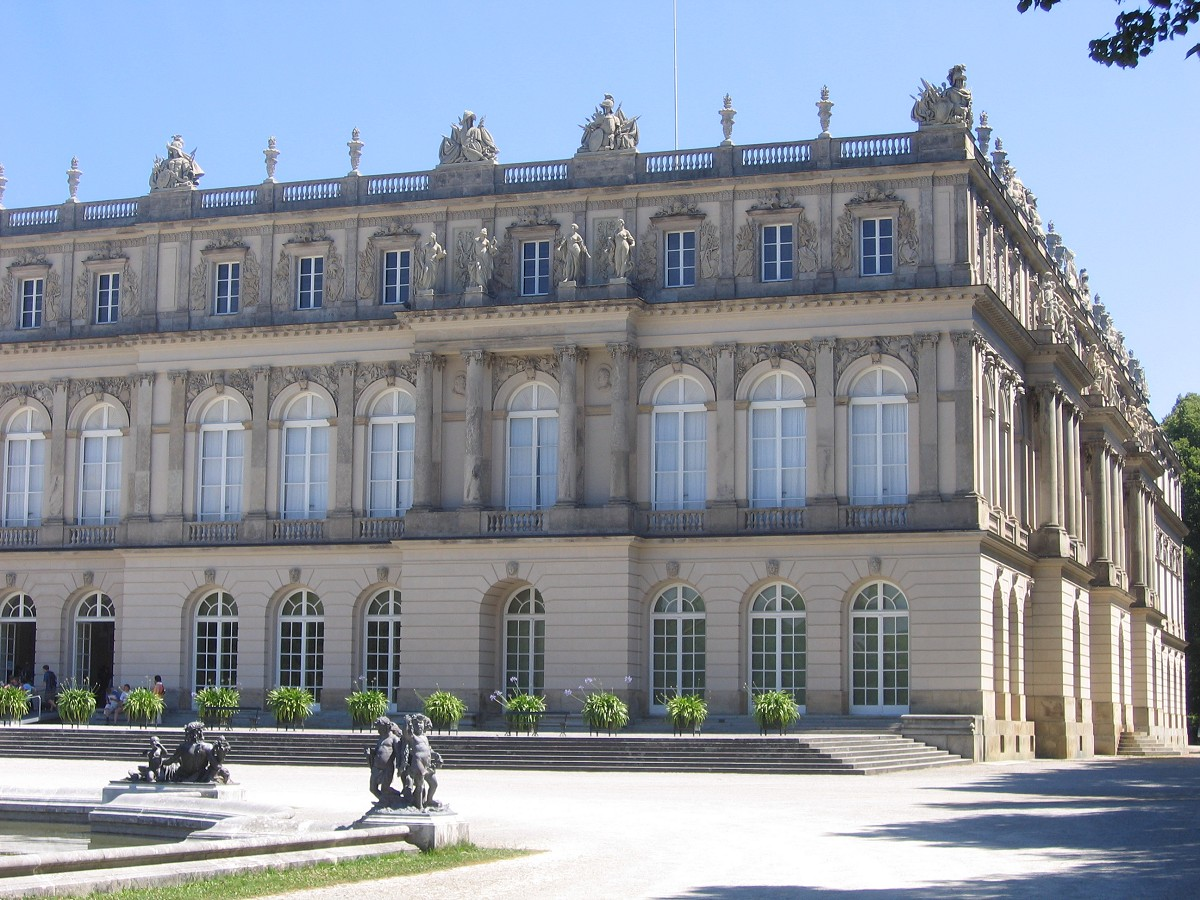 Schloss Herrenchiemsee